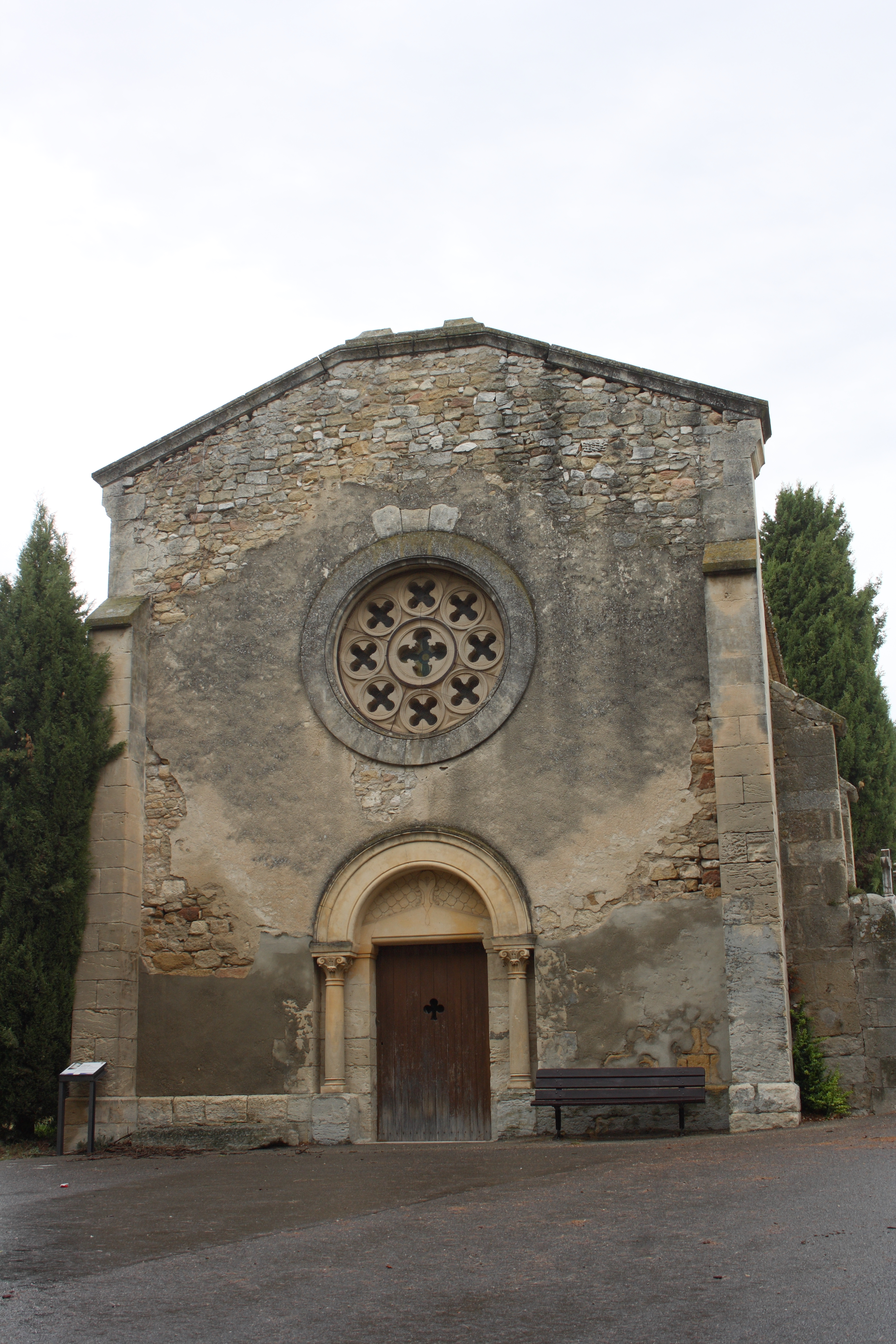 Friedhofskapelle Saint-Pierre-ès-Liens in Alleins